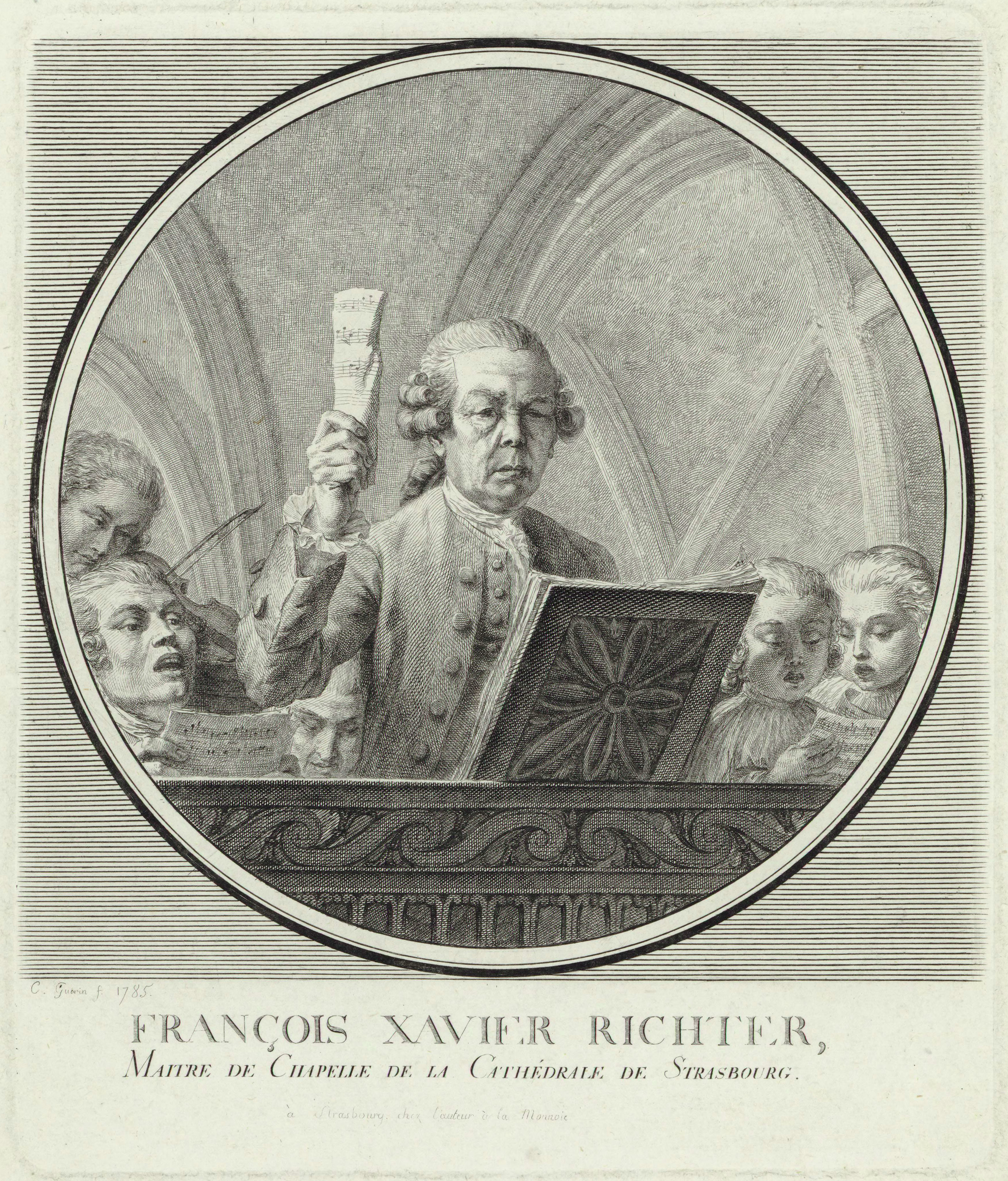 Depicted person: Franz Xaver Richter Franz Xaver Richter (1709–1789)